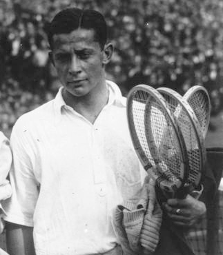 Československý prvorepublikový tenista Ladislav Hecht.